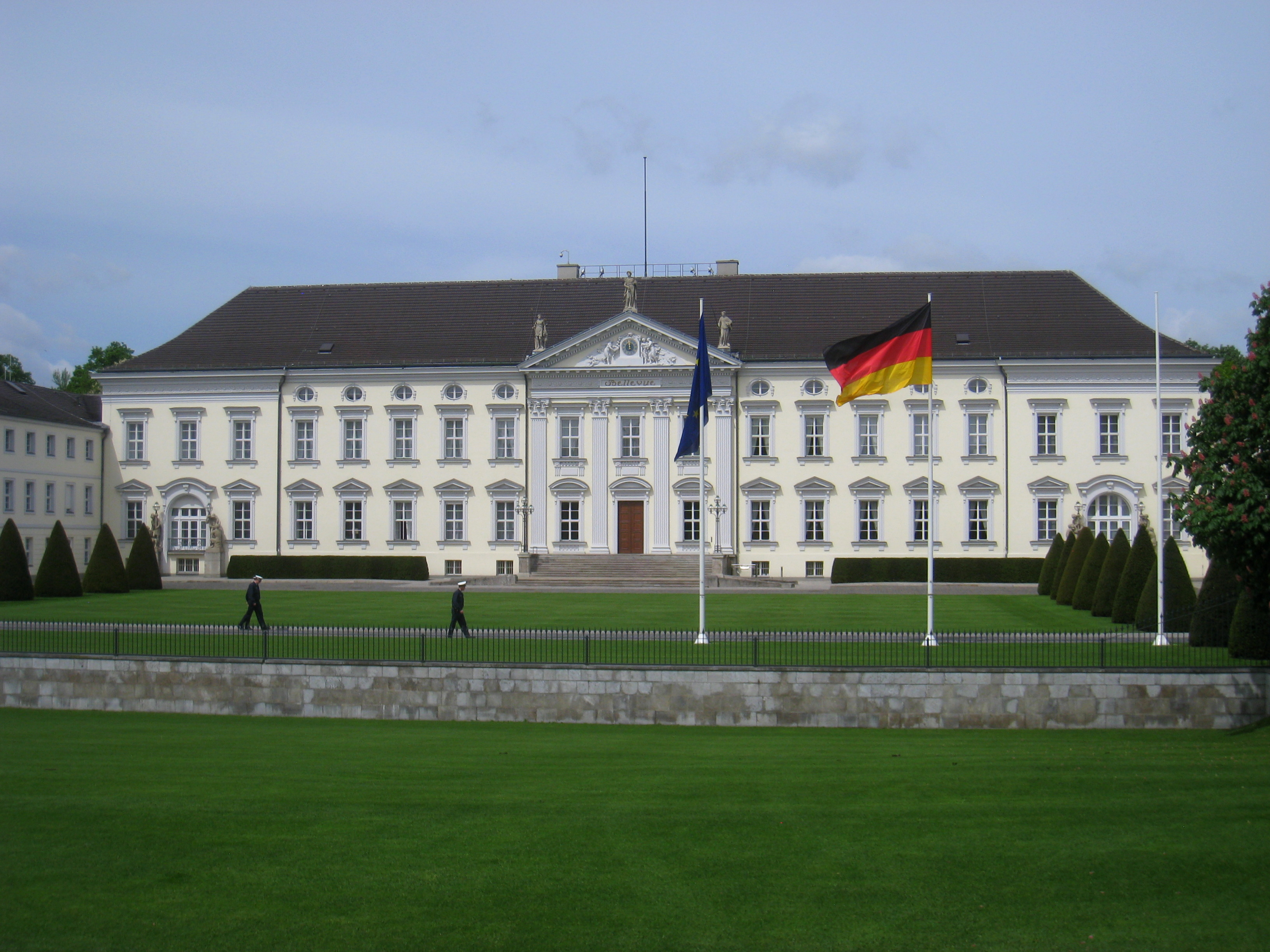 Schloss Bellevue, Tiergarten, Berlin, Germany.